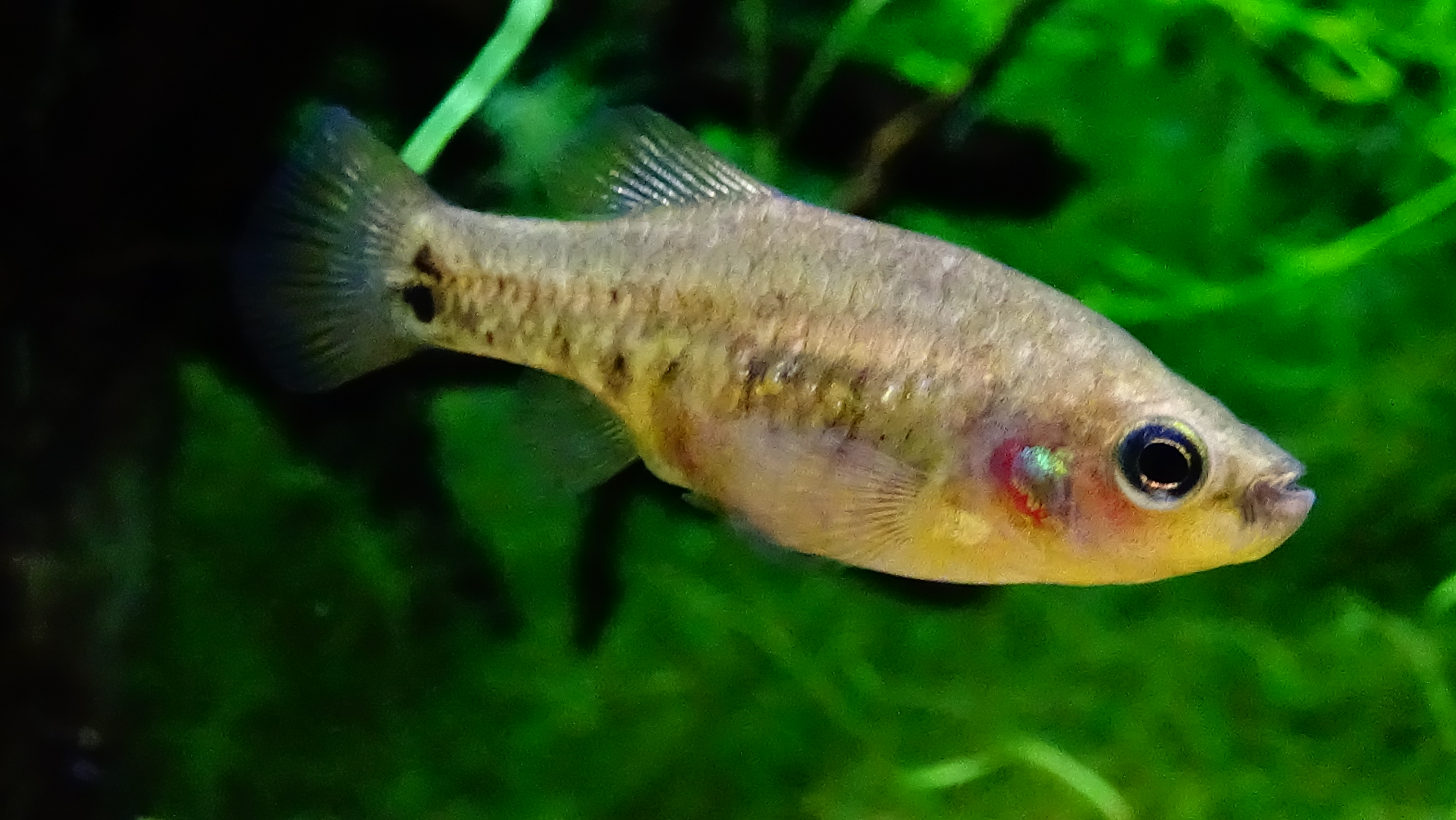 Zoogoneticus tequila - Aquarium Tropical du Palais de la Porte Dorée - Paris/France - 29/04/2015